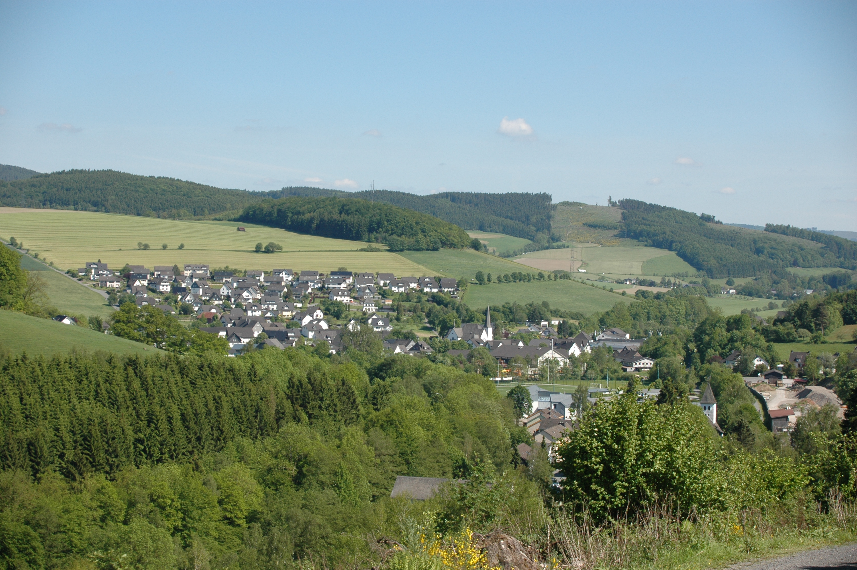 Schmallenberg-Dorlar, Hochsauerlandkreis, Nordrhein-Westfalen